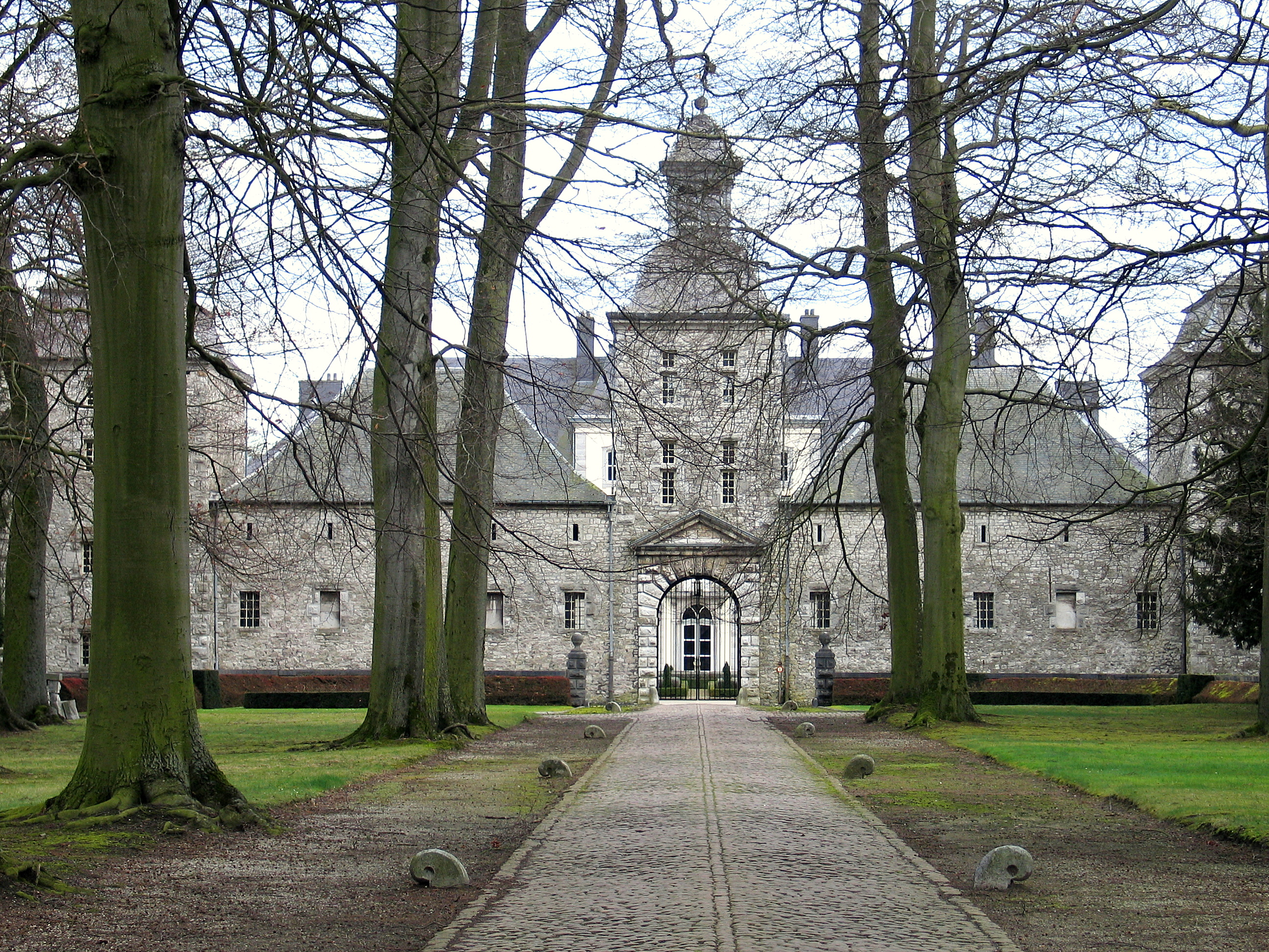 Kasteel van Warfusée - eigen werk - onder GFDL en cc-by-sa